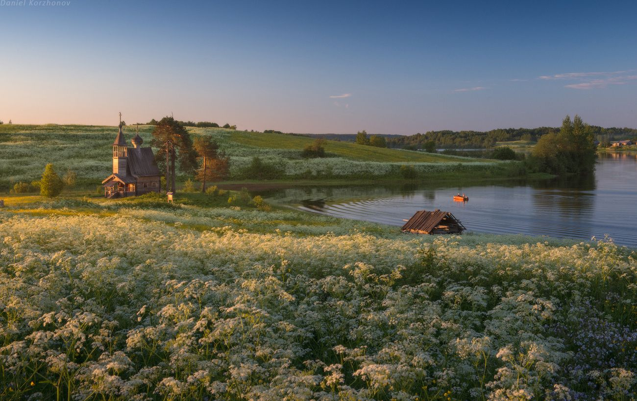 Фото К. Кокошкина